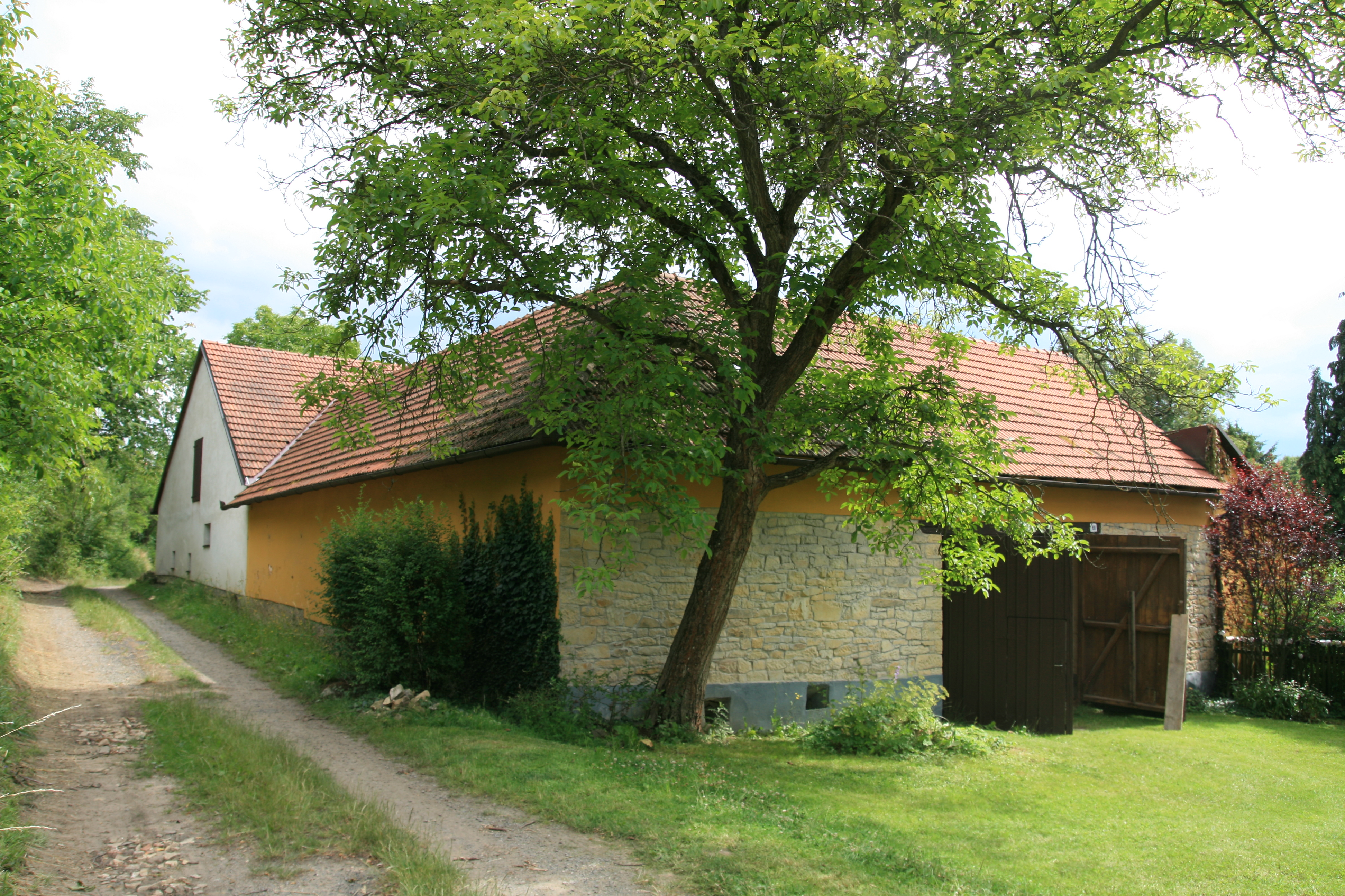 Osada Bahna, součást vesnice Dolní Smržov, část města Letovice v okrese Blansko. Statek čp. 68.